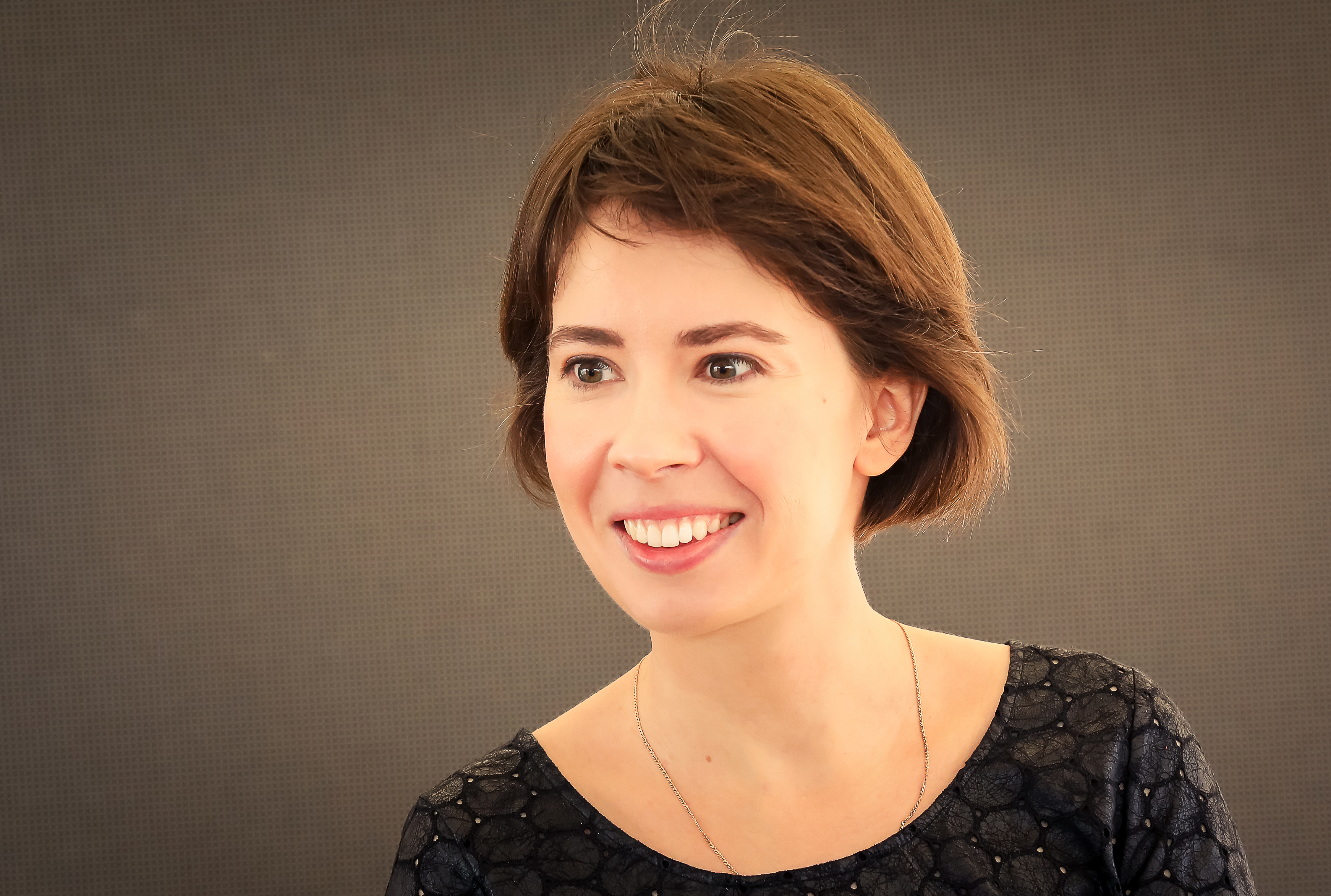 Писательница Екатерина Соболь на книжном фестивале «Красная площадь» 2019.